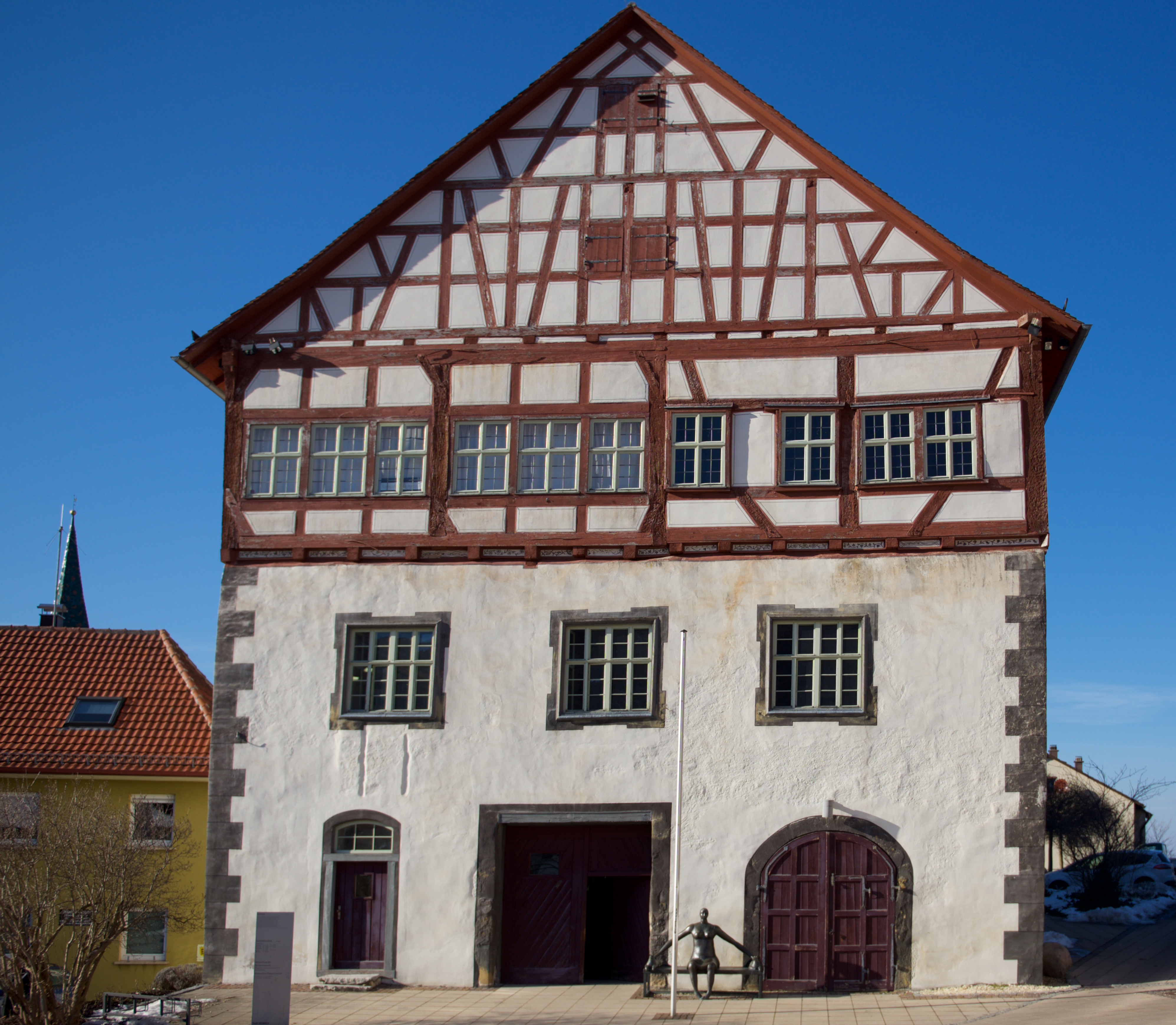 Heubacher Schloss